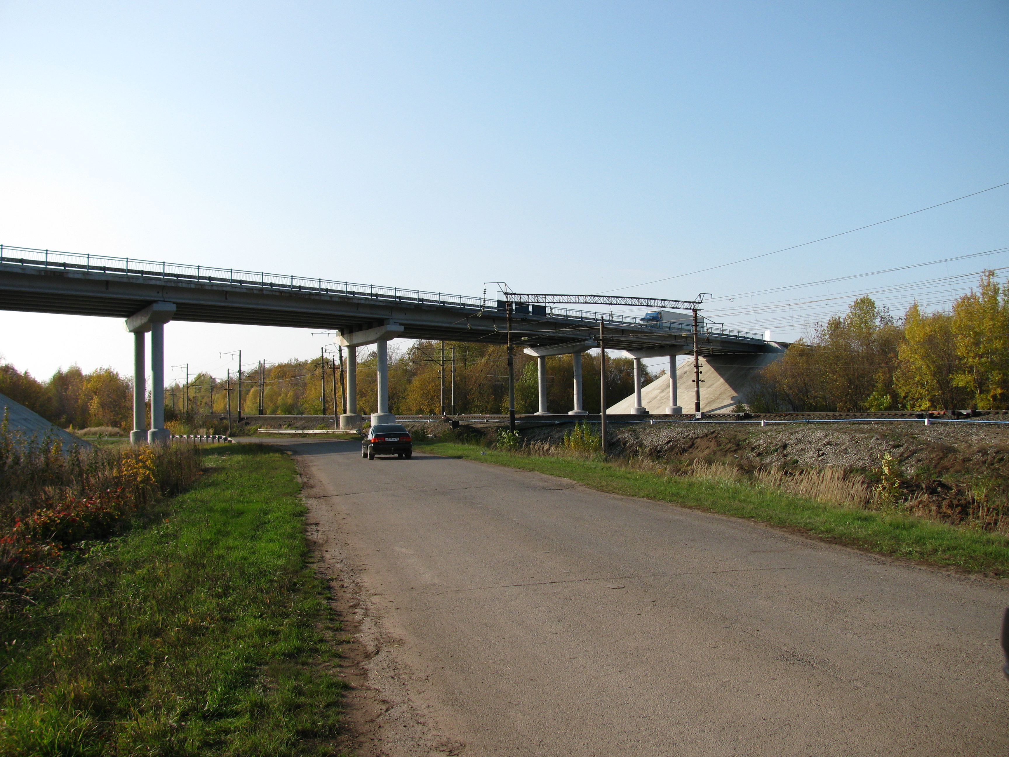 Мост над Горьковской железной дорогой